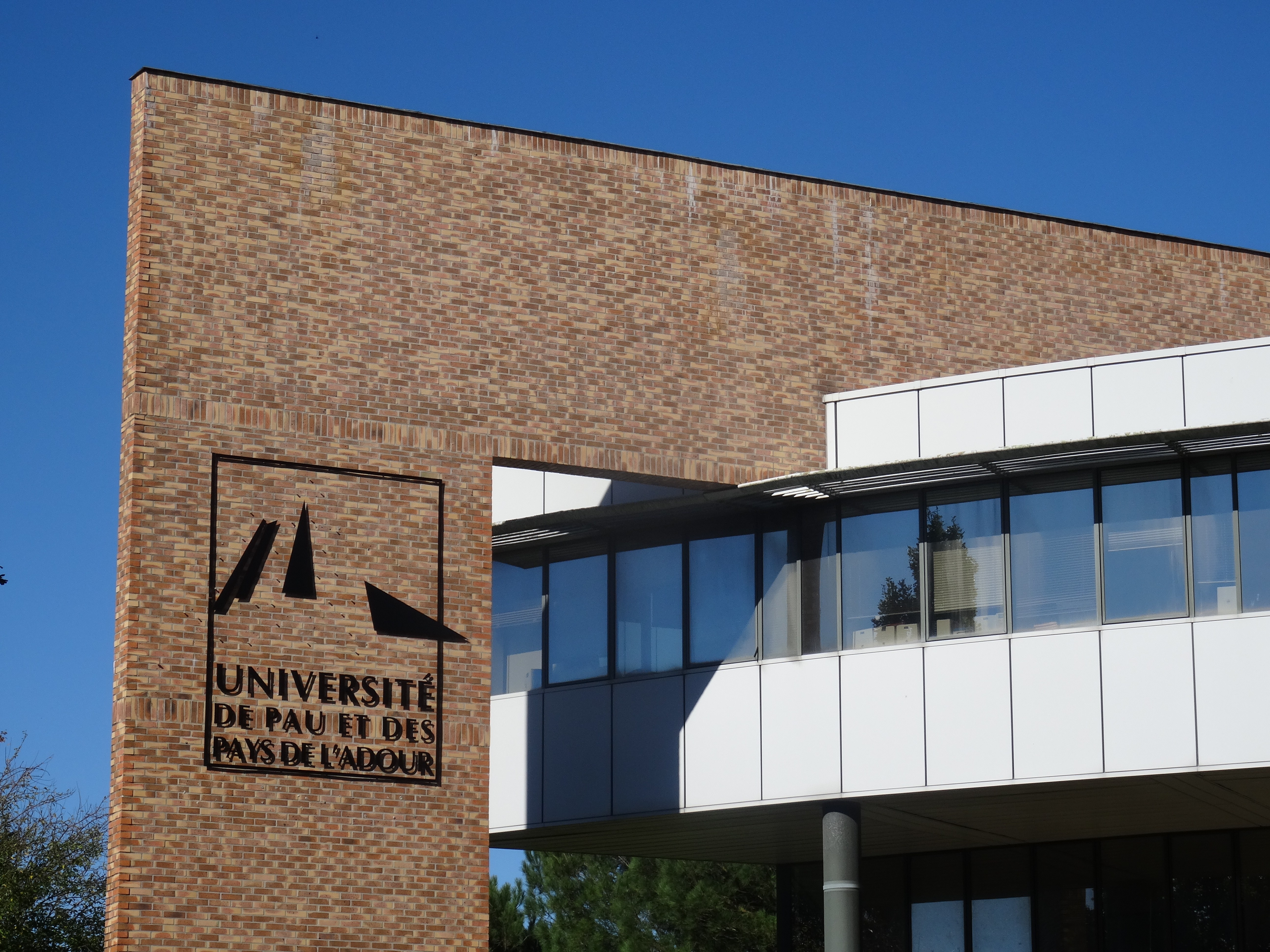 Université de Pau et des Pays de l'Adour